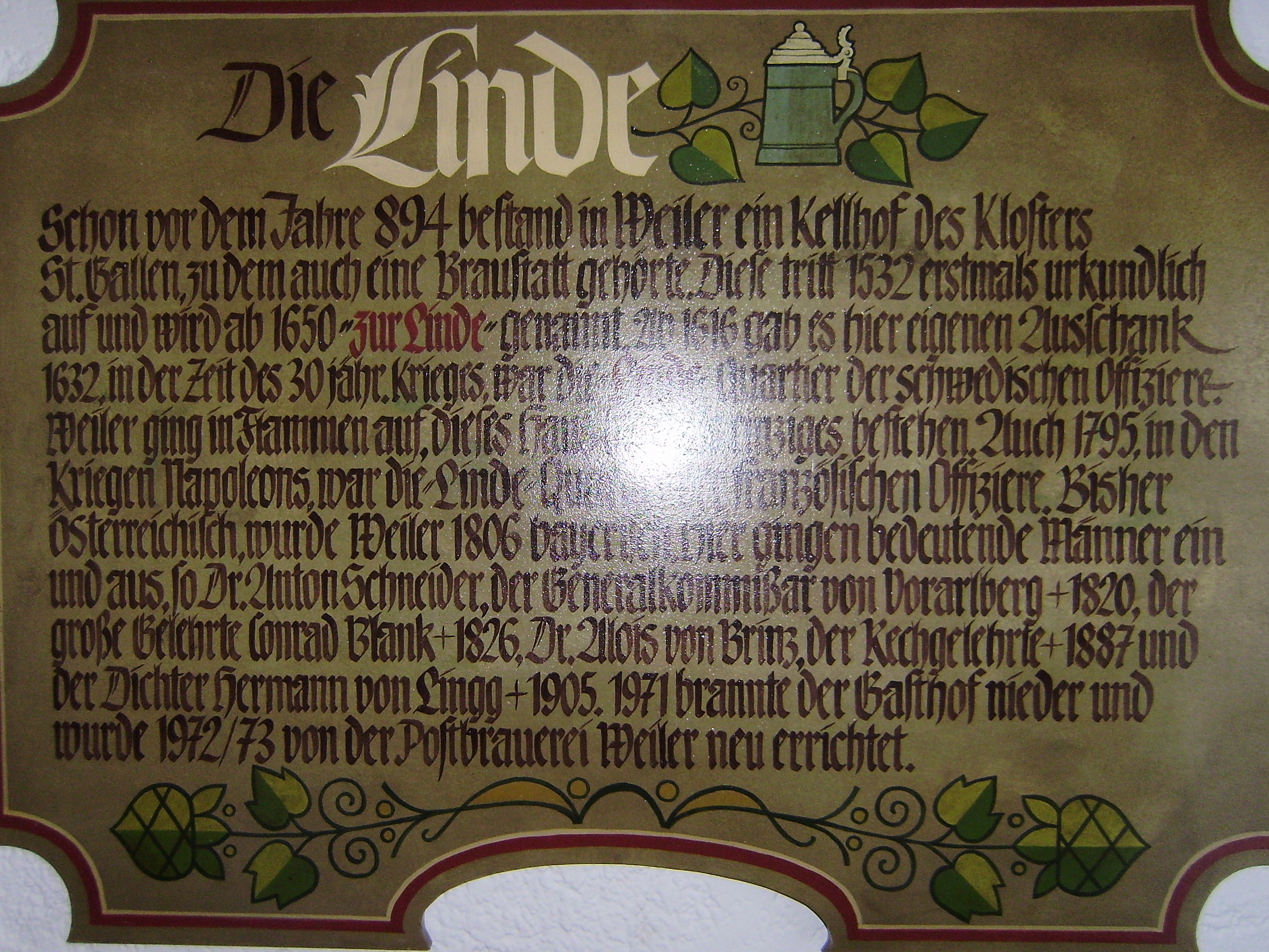 Erinnerungstafel mit berühmten Gästen im Eingangsbereich des alten Gasthofs Linde in Weiler im Allgäu (Bayern, Deutschland)